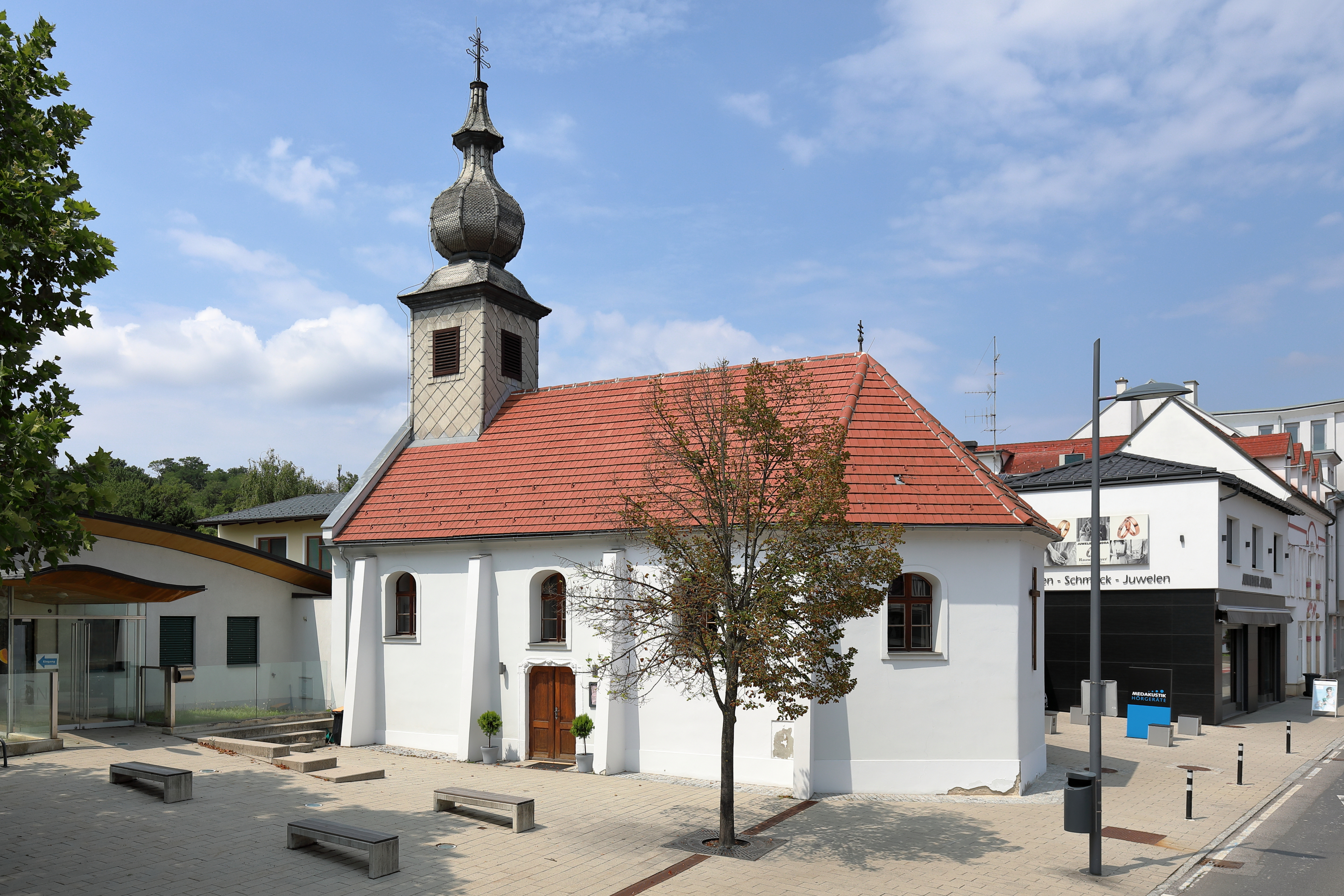 Die röm.-kath. Franziskuskirche, eigentlich Kapelle zum hl. Franz von Assisi, in der burgenländischen Bezirkshauptstadt Oberpullendorf.Ursprünglich 1707 als Kapelle zu Ehren der Jungfrau Maria errichtet und damit ältestes Gebäude der Stadt Oberpullendorf. 1736 ließ Emmerich Madarász einen neuen Hochaltar mit Altarbild, welches den hl. Franziskus darstellt, errichten. 1785 wurde die Kapelle umgebaut und erhielt einen Turm mit Zwiebelhelm.